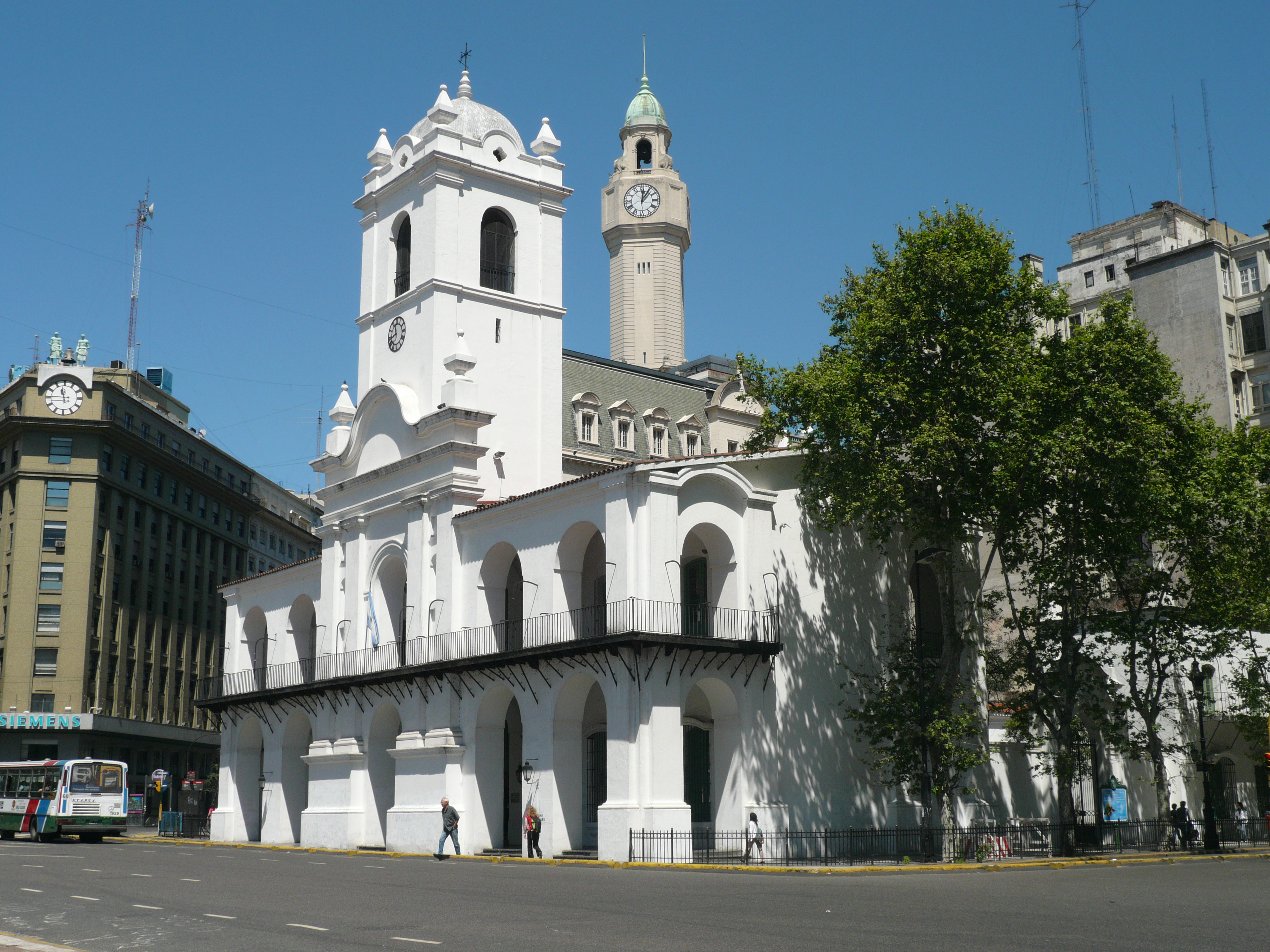 El Cabildo rq